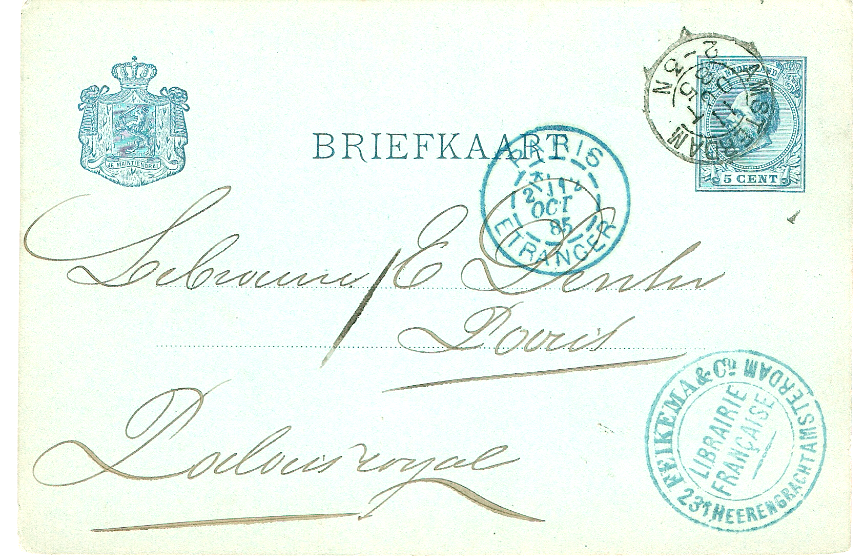 Entier postal des pays-bas expédié en 1885, marque Paris étranger